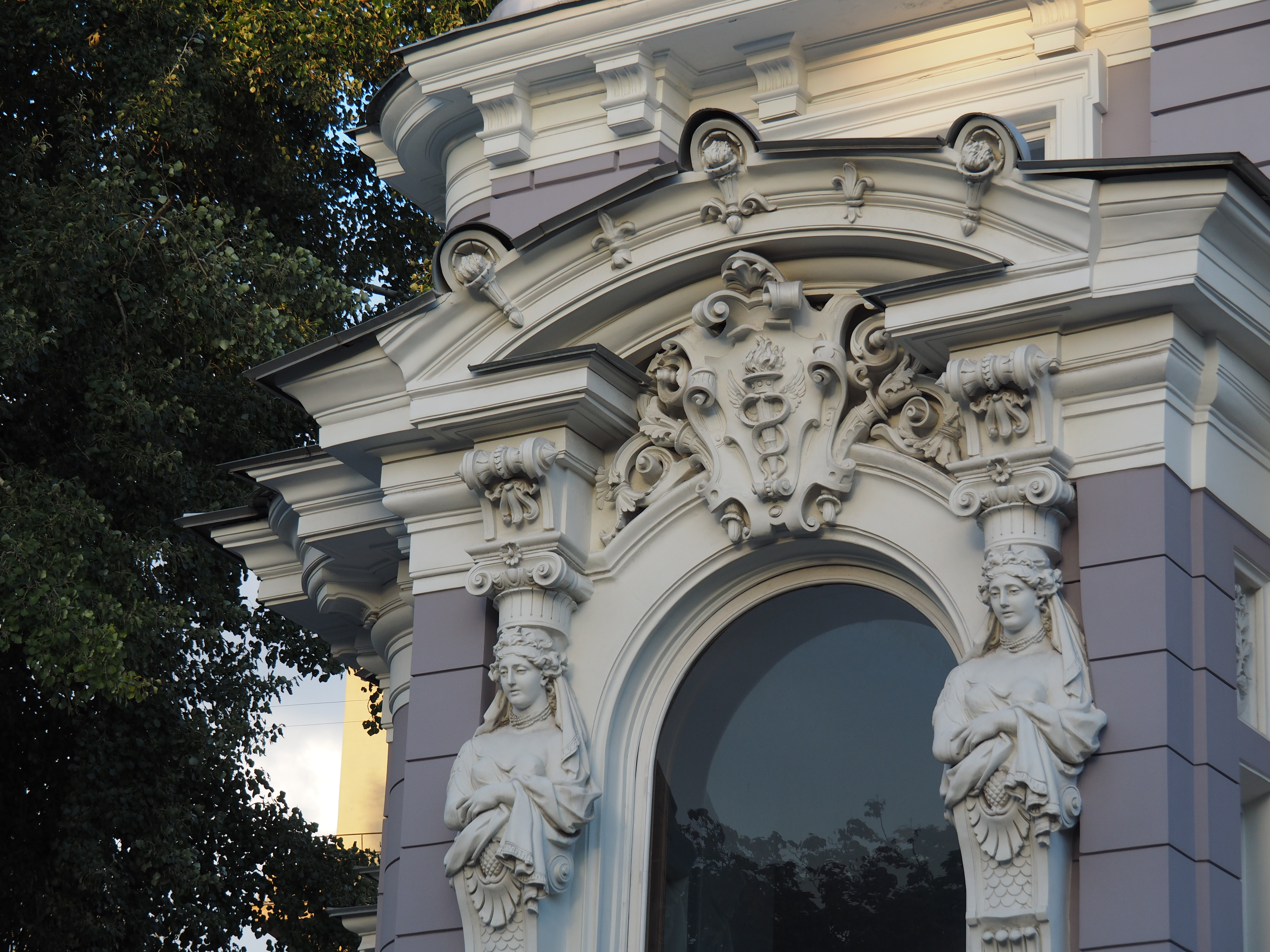 Особняк О.П. Коробковой со служебным флигелем и оградой: Пятницкая ул., дом 33-35, строение 3, Замоскворечье, Центральный округ, Москва